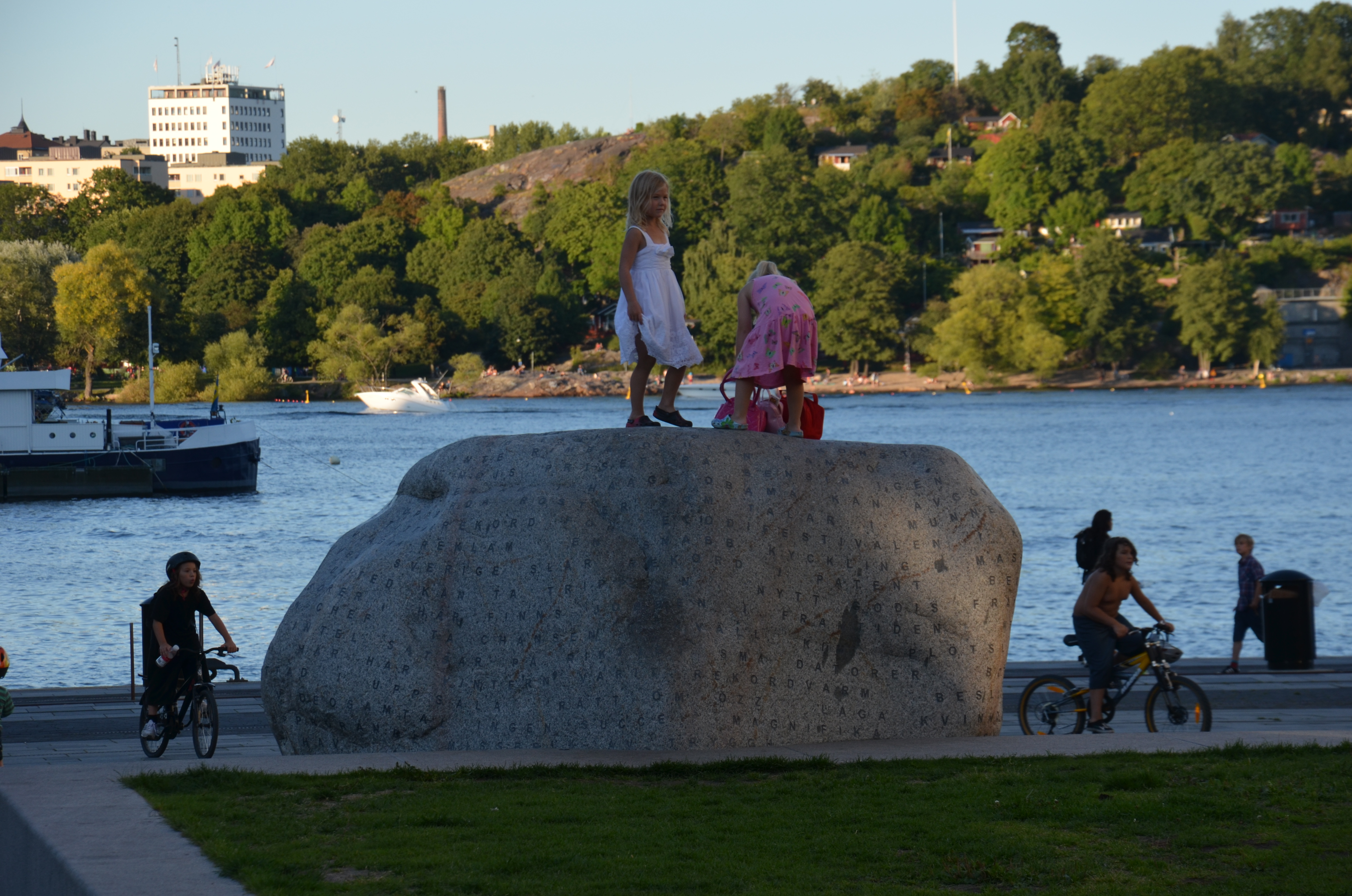 En tidsmaskin på torget av Jan Svennungsson i Årstadal i Stockholm